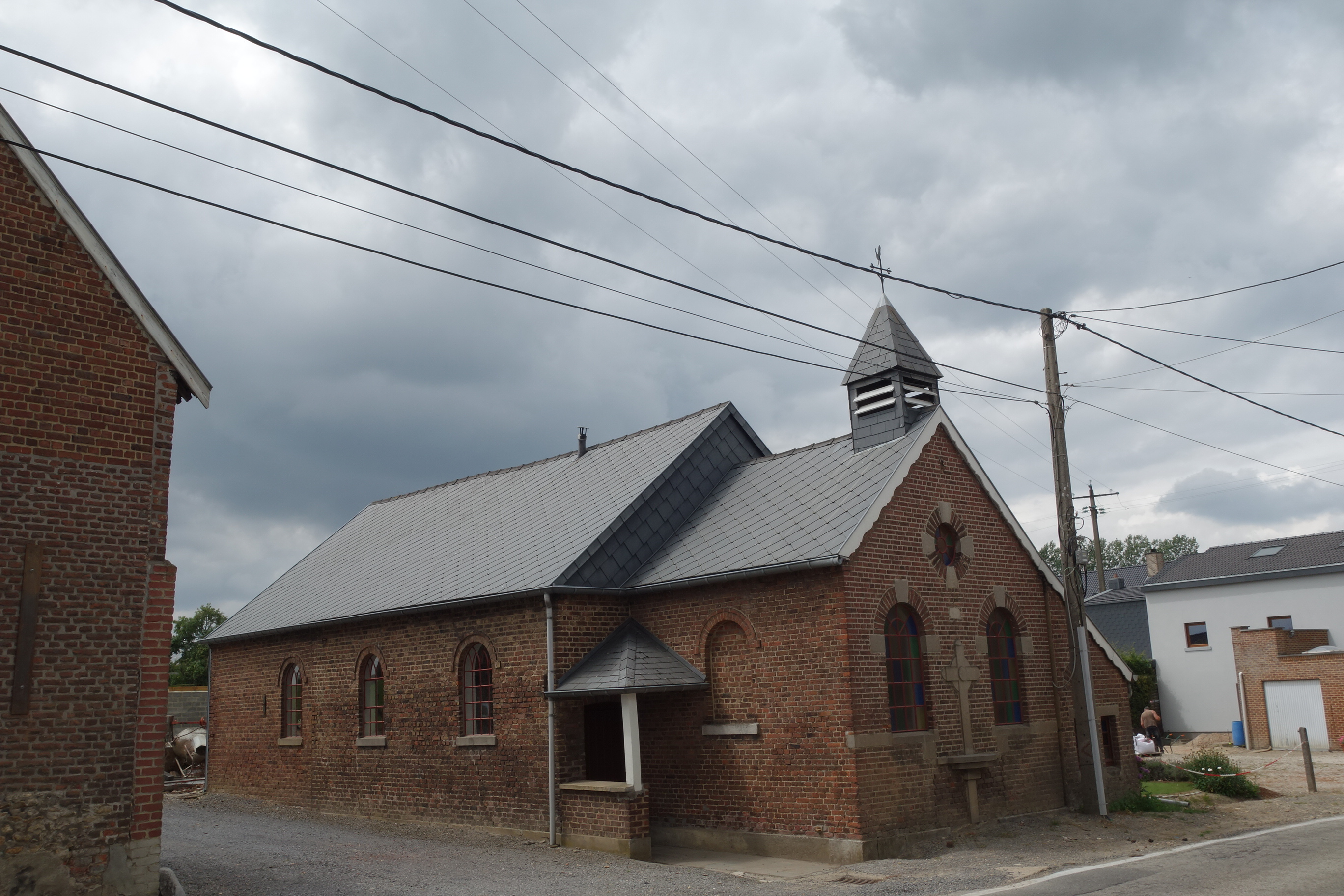 Sint-Rochuskapel op De Plank in Sint-Martens-Voeren, in juli 2020.